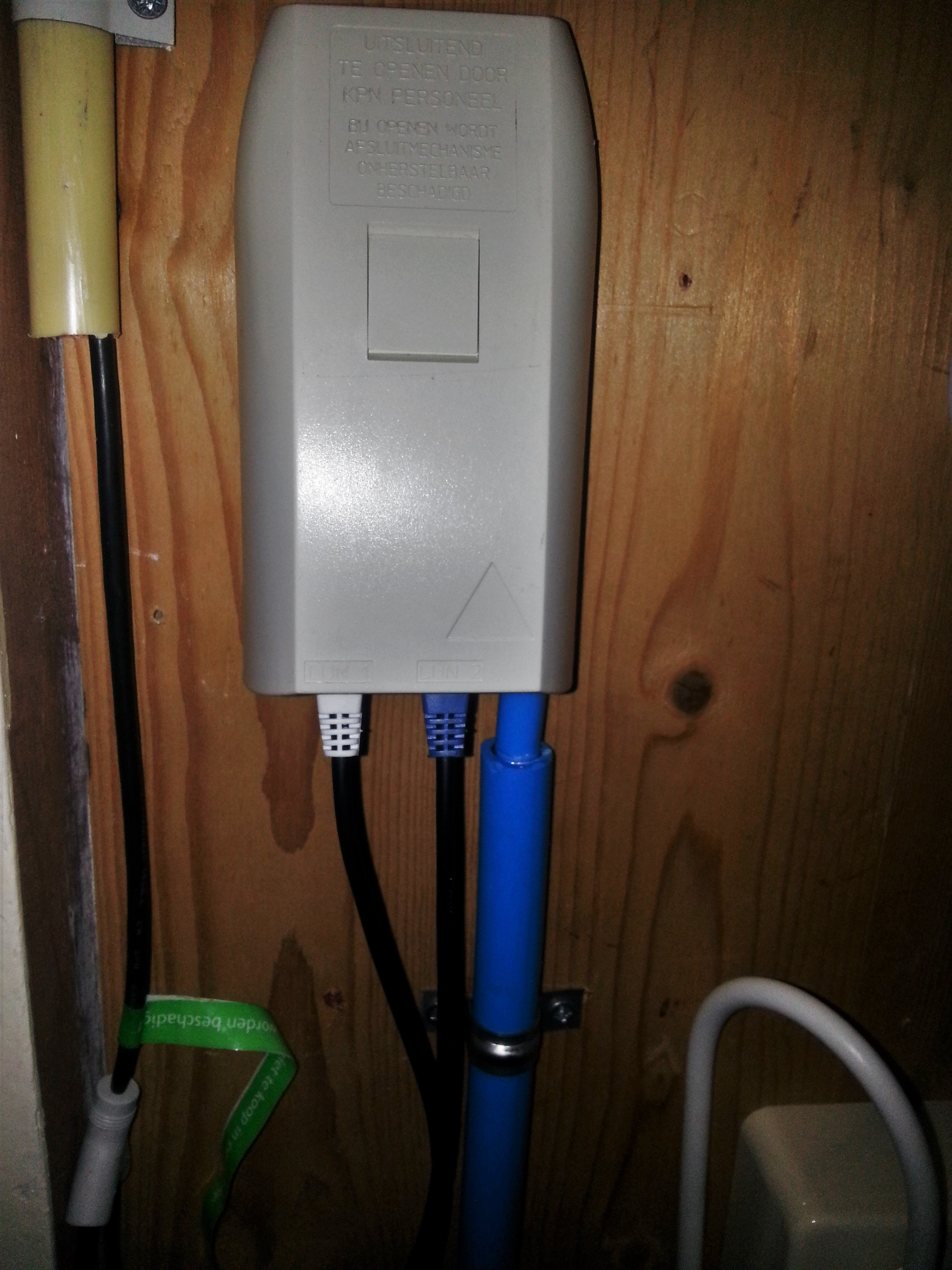 ISRA type 2, te herkennen aan de twee rj11 aansluitingen. Hierdoor is dit type zowel geschikt voor een normale enkele (x)dsl, als voor pairbonding, waarbij de twee aansluitingen gecombineerd worden tot 1 met een dubbele bandbreedte.